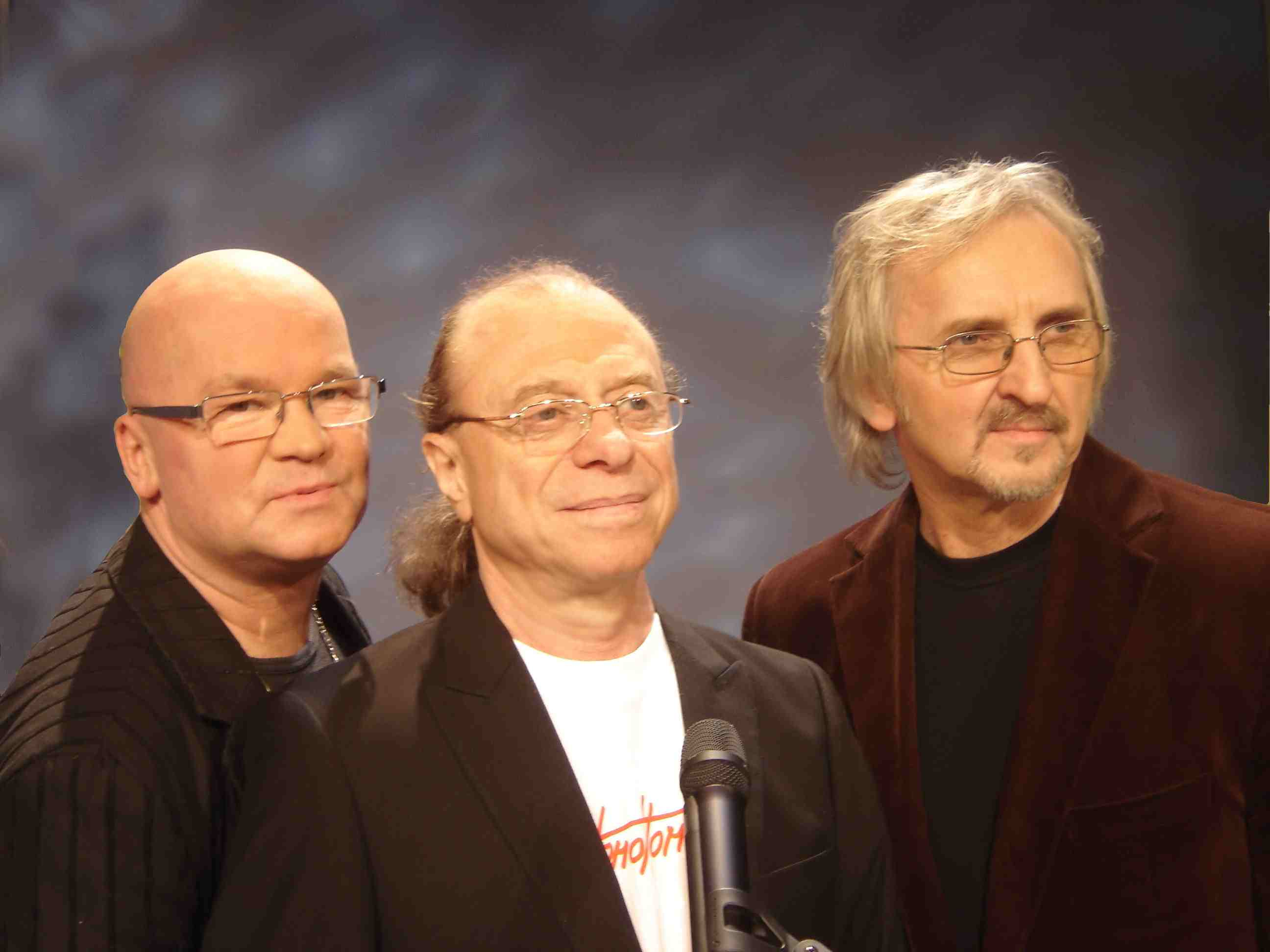 Homo Homini po wznowieniu działalności wiosną 2008. Wiosną zaczęli nagrywanie płyty, wyjdzie w połowie października 2008. Na zdjęciu od lewej Piotr Nagiel, Aleksander Nowacki, Marek Fijałkowski.